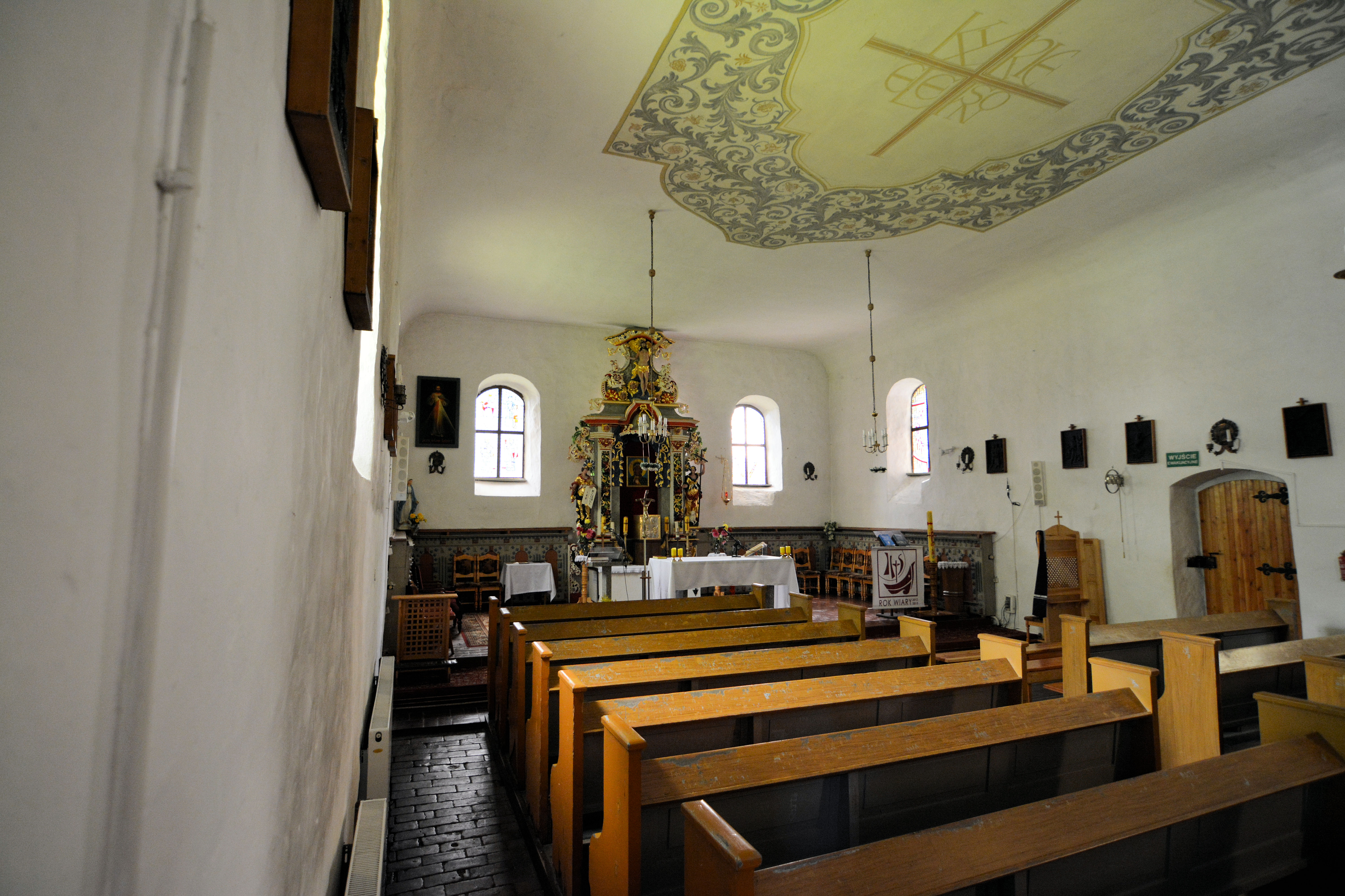 Kościół w Przelewicach